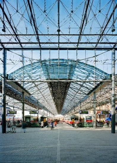 Helsingin rautatieaseman asemapihan kattaminen, 2001